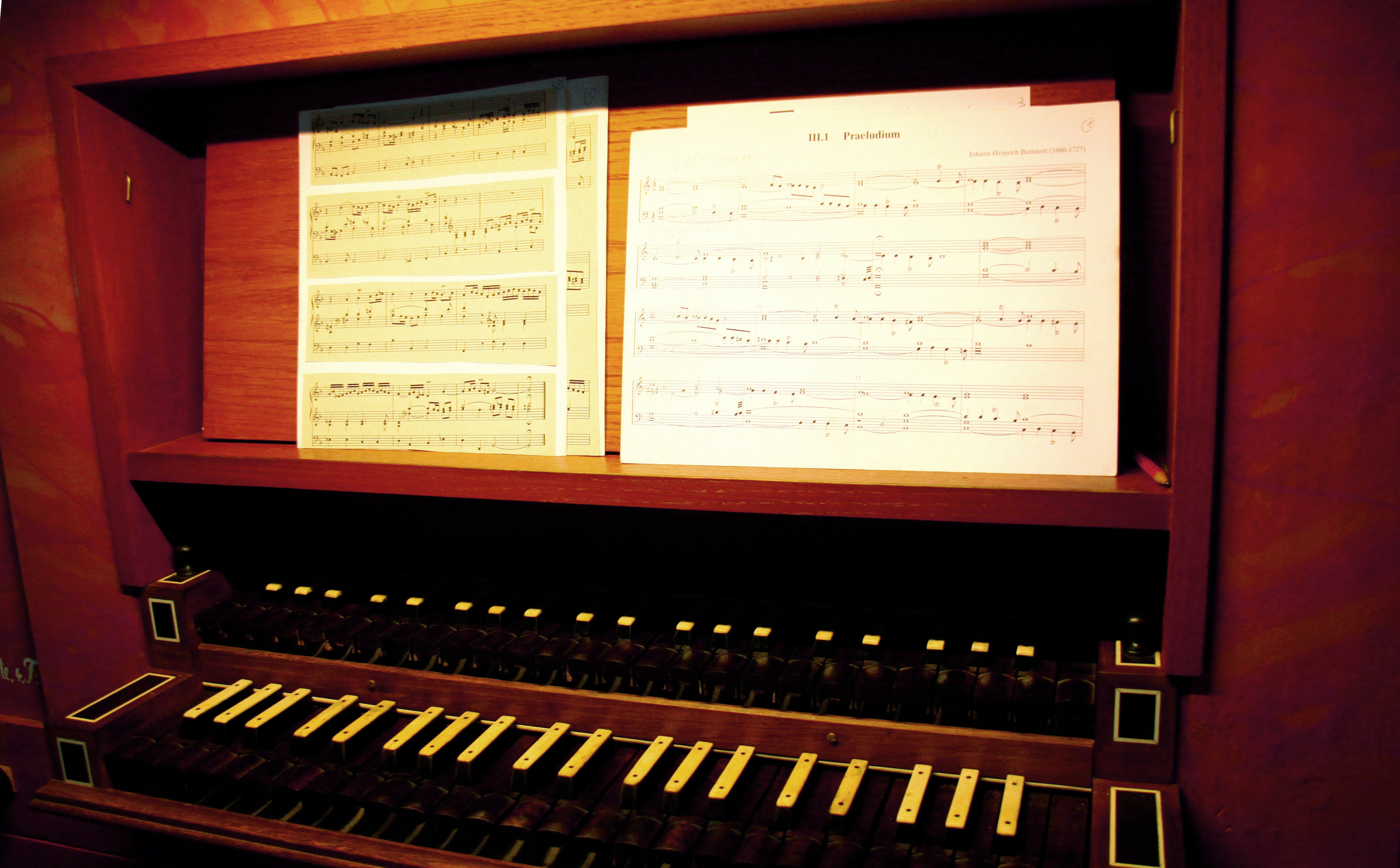 Kirche St. Cyprian und Cornelius Ganderkesee – Orgel